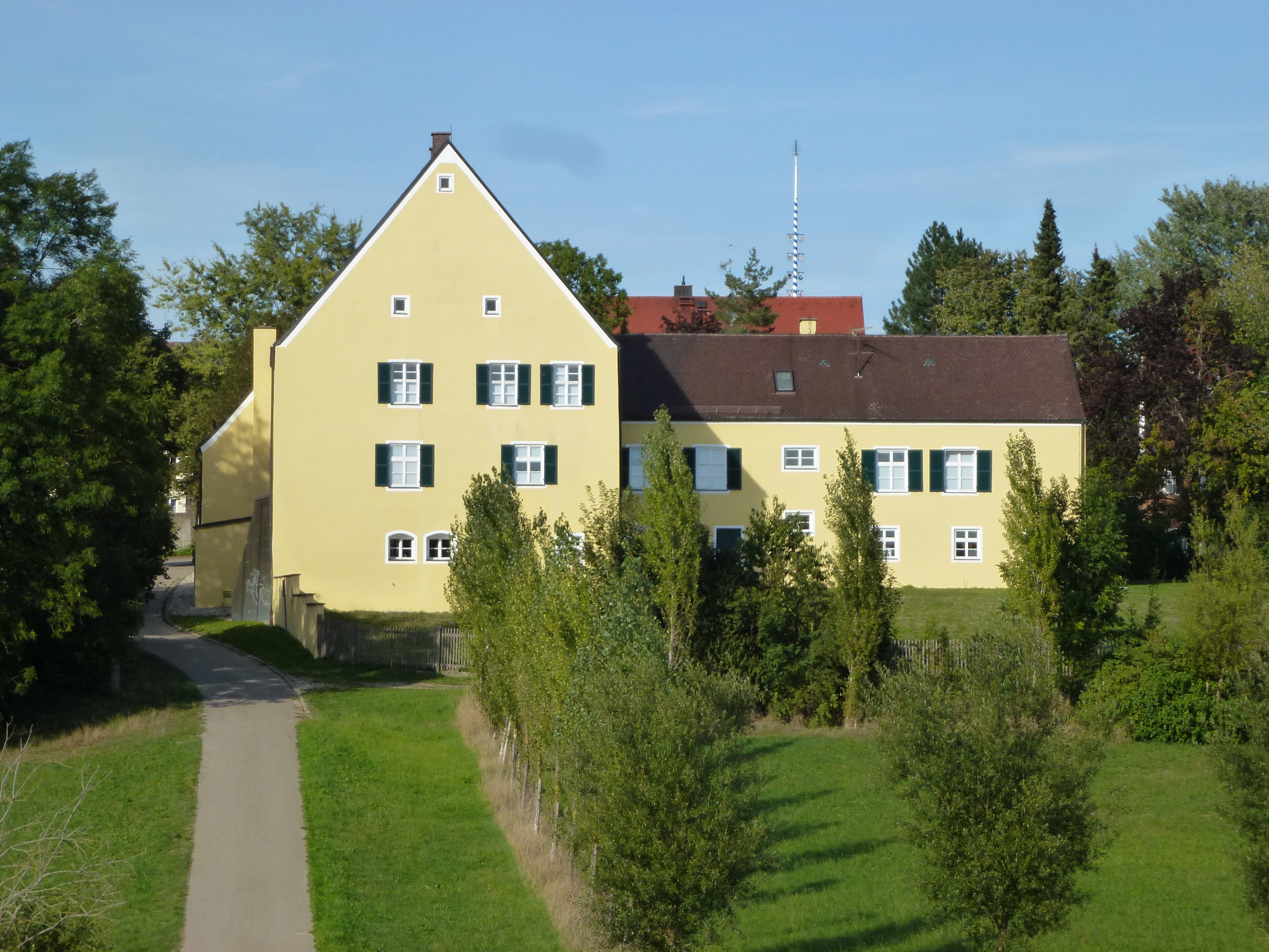 Tandern, Schloßplatz 1: Ehemaliges Schloß. Ansicht von SSW